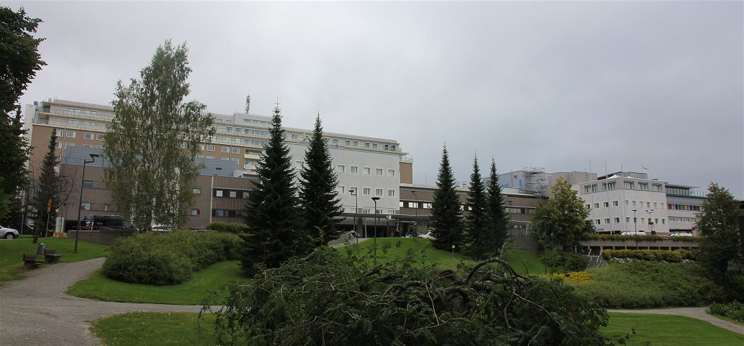 Kuopion yliopistollisen sairaalan (KYS) Puijon sairaala Kuopion Puijonlaakson kaupunginosassa.